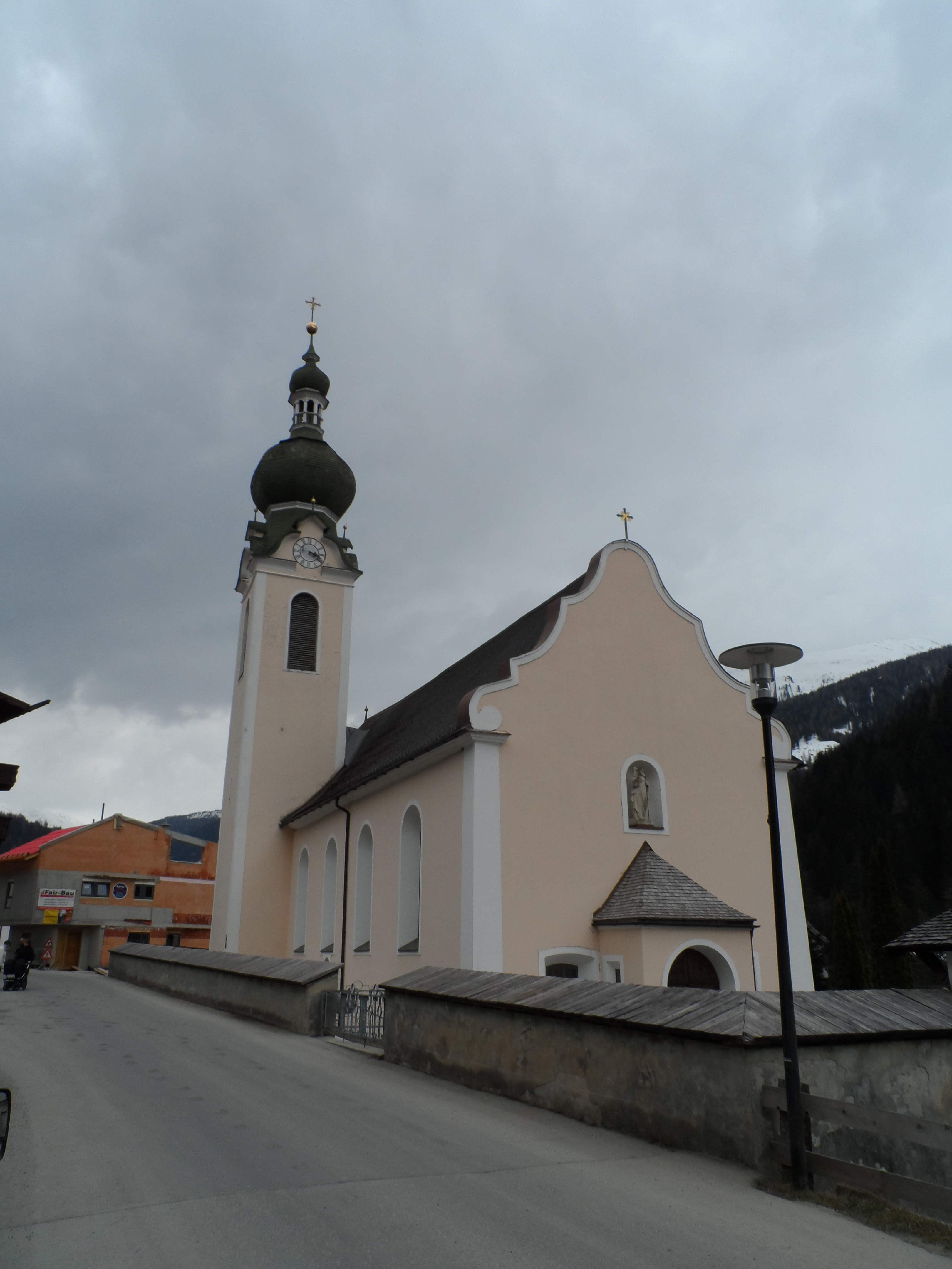 Kath. Pfarrkirche hl. Bartholomäus - Flirsch